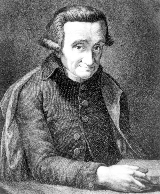 Juan Ignacio Molina (Hacienda "Huaraculén", comuna de Villa Alegre, Provincia de Linares, Región del Maule, Chile, 24 de junio de 1740 - Imola, provincia de Bolonia, Italia, 12 de septiembre de 1829), fue un sacerdote, naturalista, geógrafo, y cronista chileno, también conocido como Abate Molina, y en Italia como Giovanni Ignazio Molina.